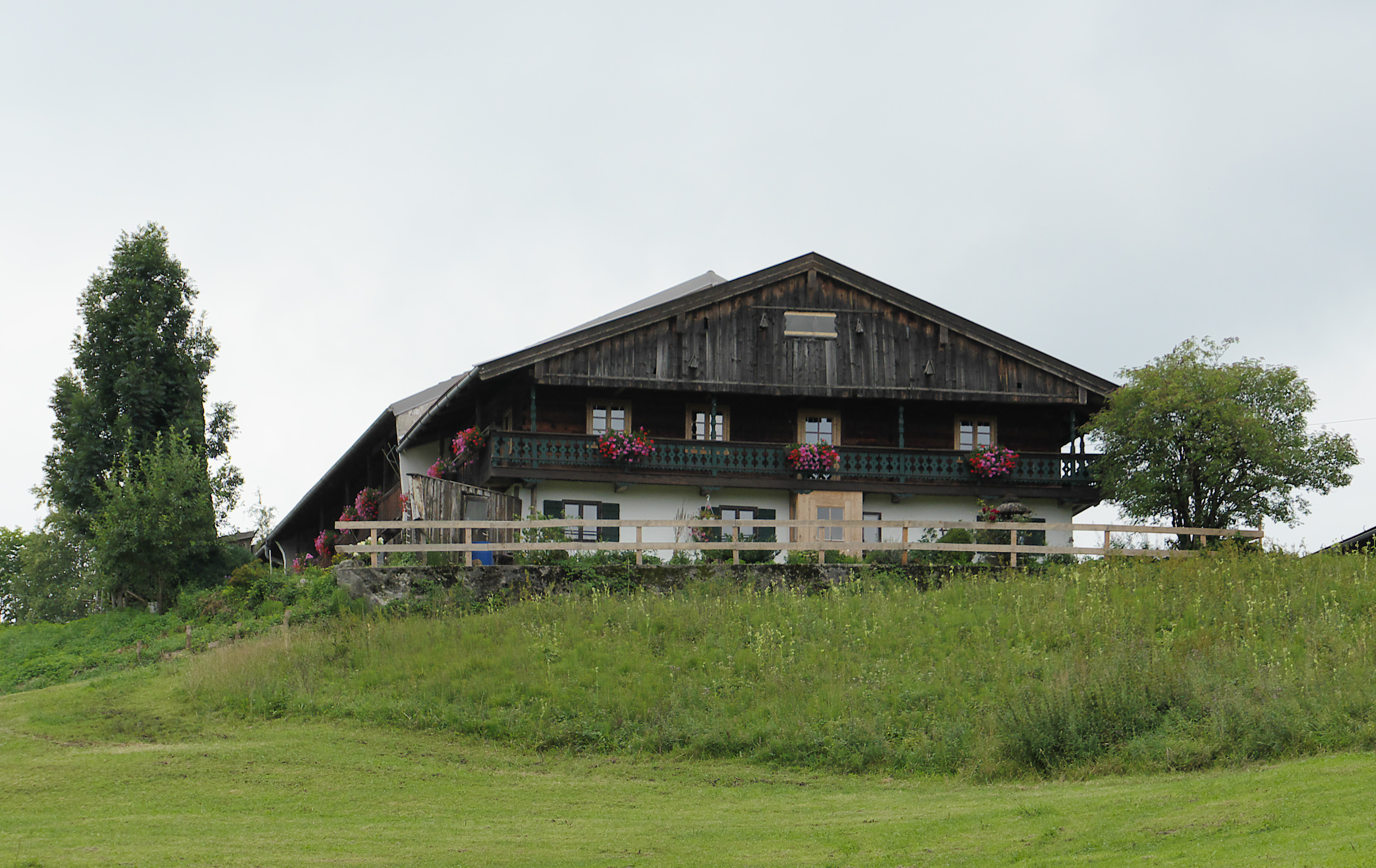 Gaißach Reut 1A